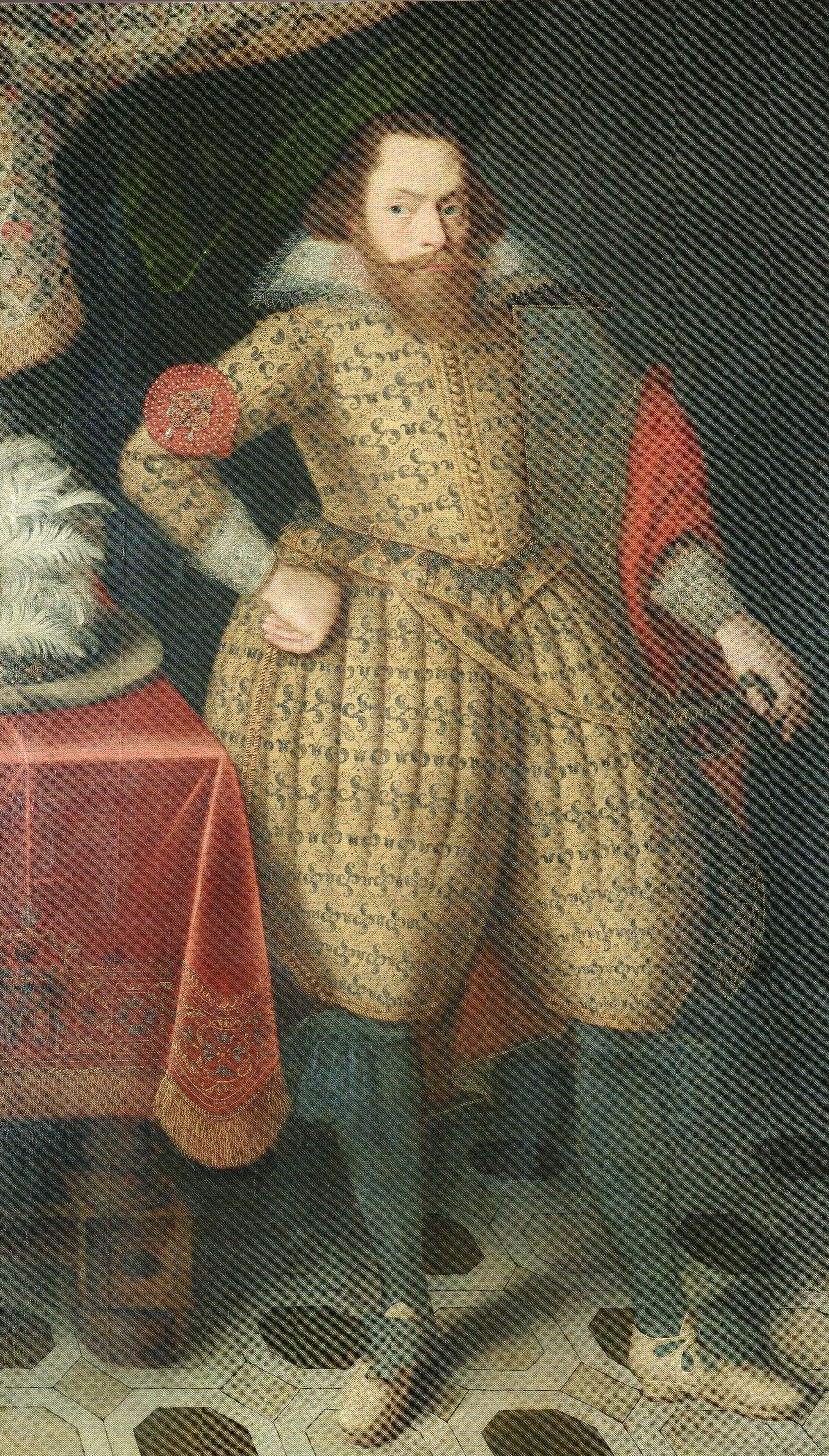 Ölgemälde von Herzog Franz von Pommern-Stettin